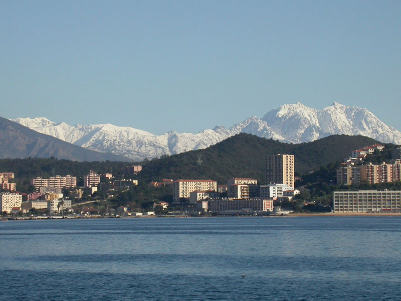 Baie d'Ajaccio